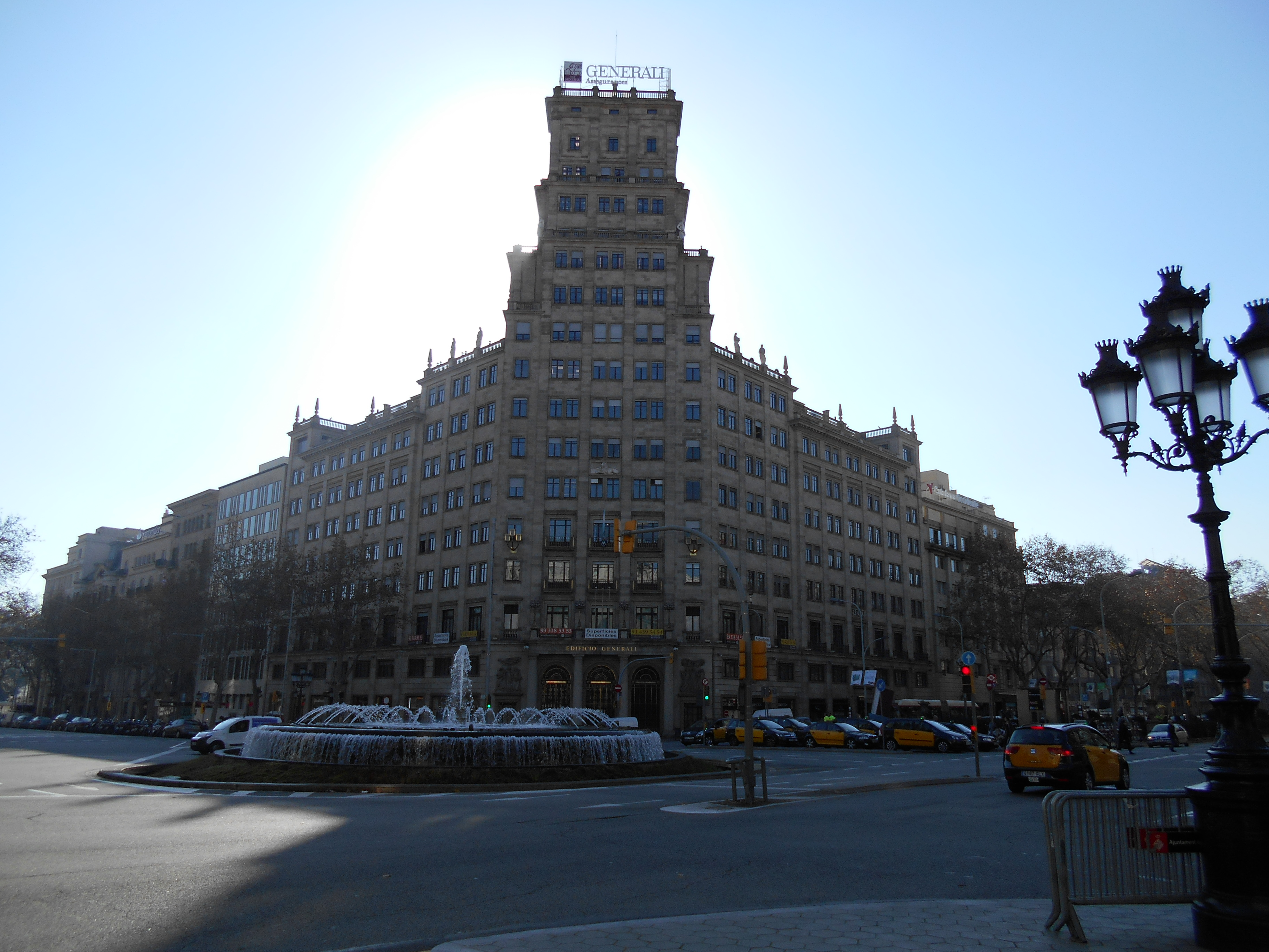 Banco Vitalicio, de Lluís Bonet i Garí, Barcelona.